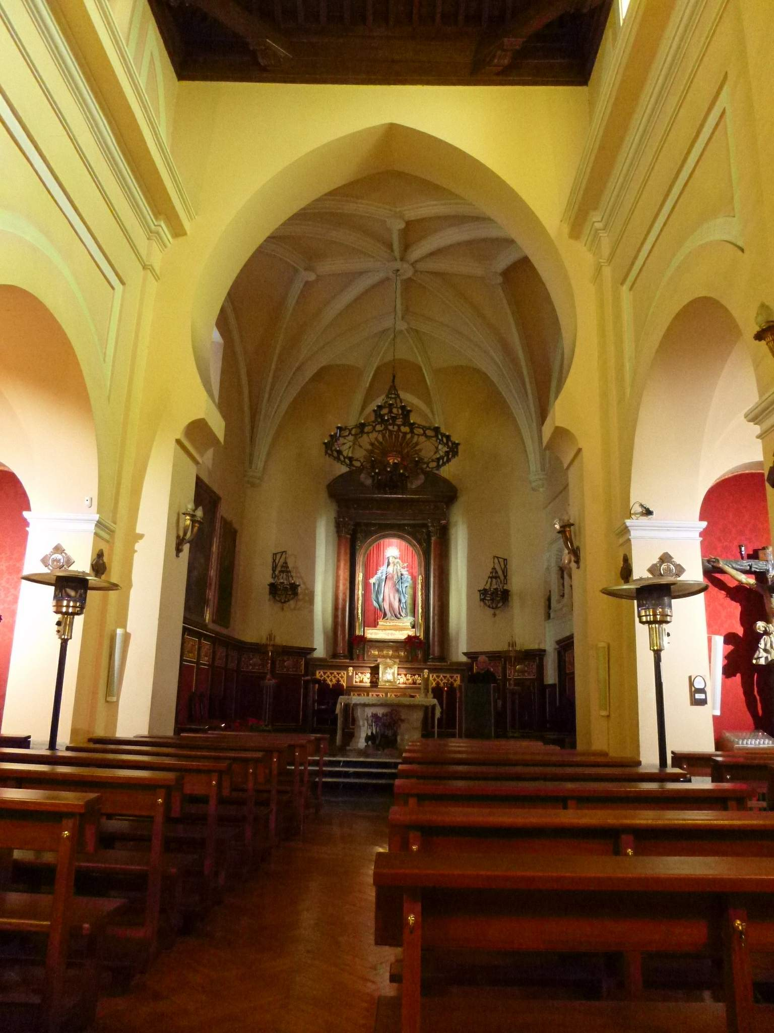 Iglesia de San Nicolás de los Servitas (Madrid)